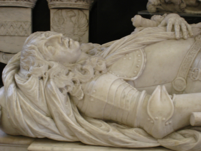 Tomb Willem Joseph van Ghent, Domkerk, Utrecht